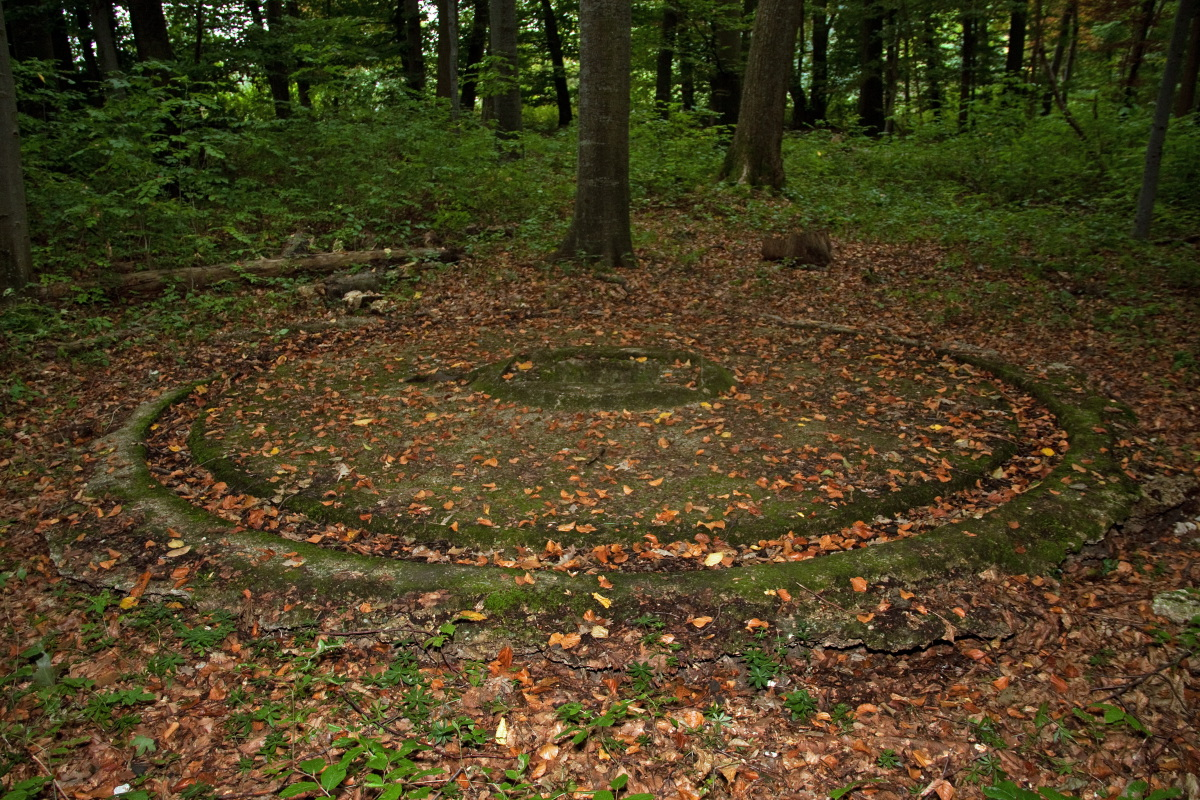 Überreste einer Natter-Startstelle für die Operation Krokus bei Kirchheim/Teck.